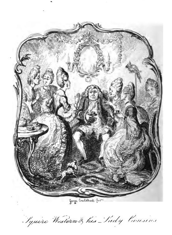 Illustration de George Cruikshank pour une édition de Tom Jones chez George Bell and Sons, livre XVII, ch.III Le squire Western, en visite chez sa sœur à Londres, est « entré dans un salon rempli de femmes » mais a l'impression d'être tombé « dans un chenil de chiennes à paniers ! »